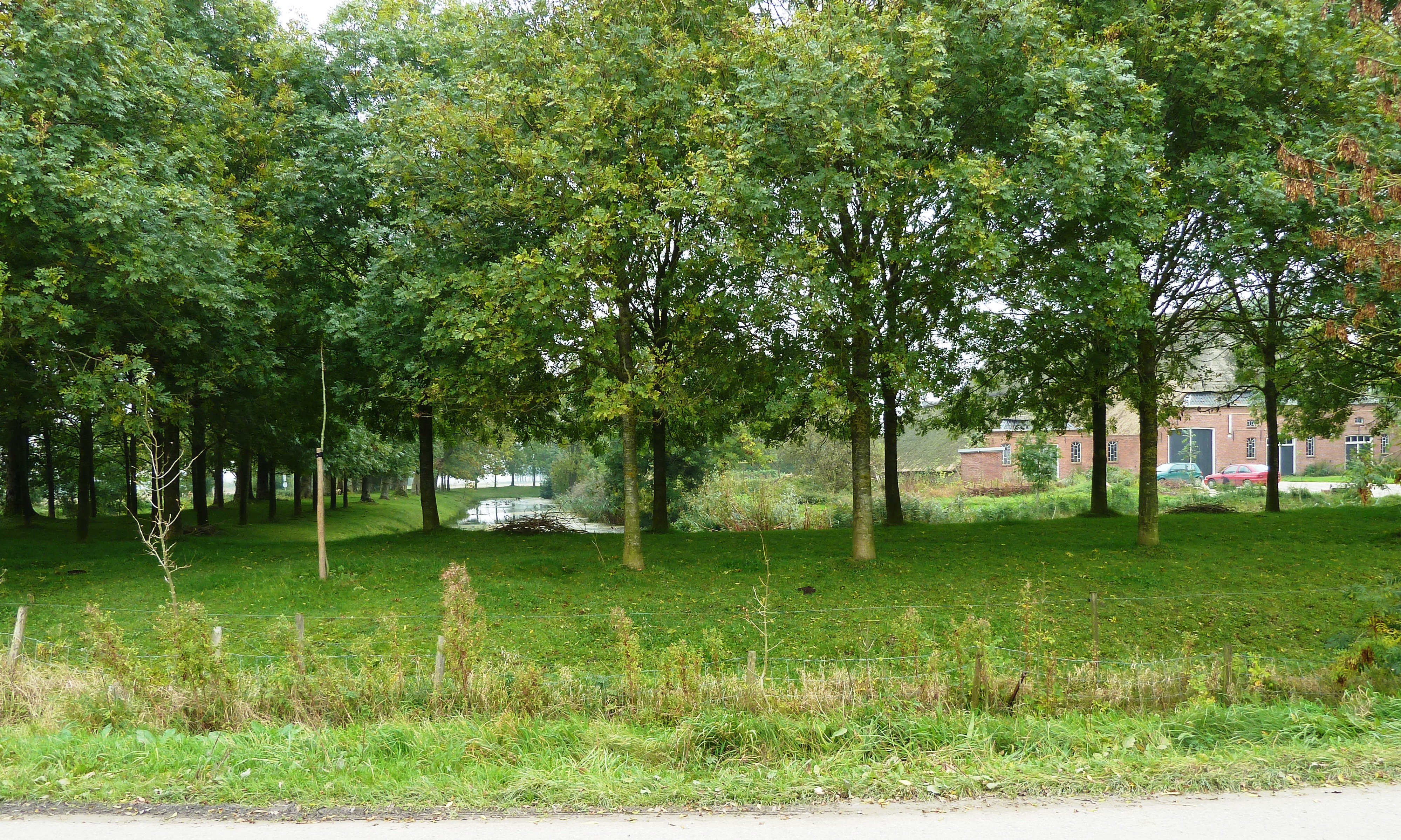 Gedeelte van de gracht rond de 'westersche plaats' van Ruigezand.